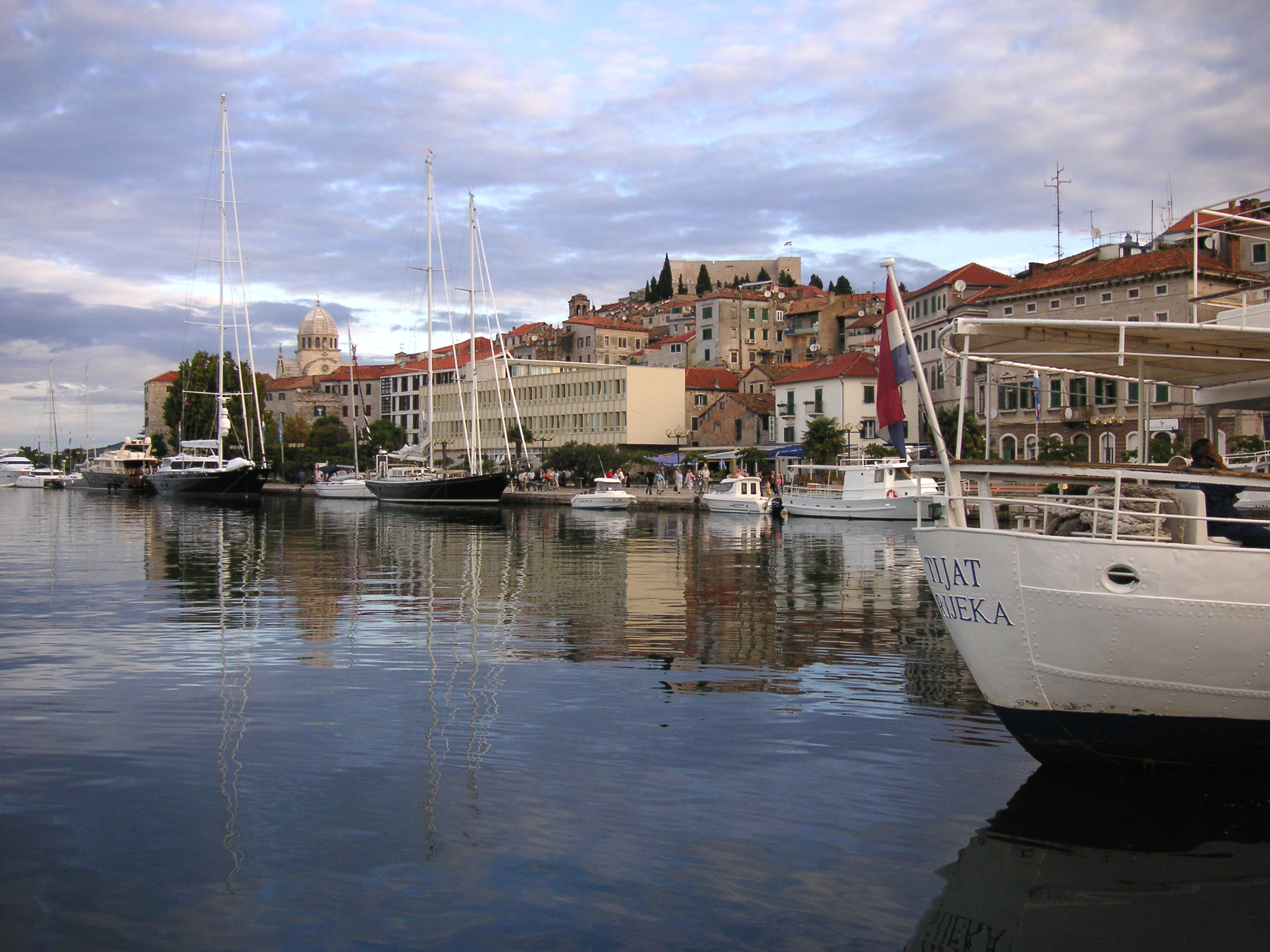 Šibenik, Croatia.